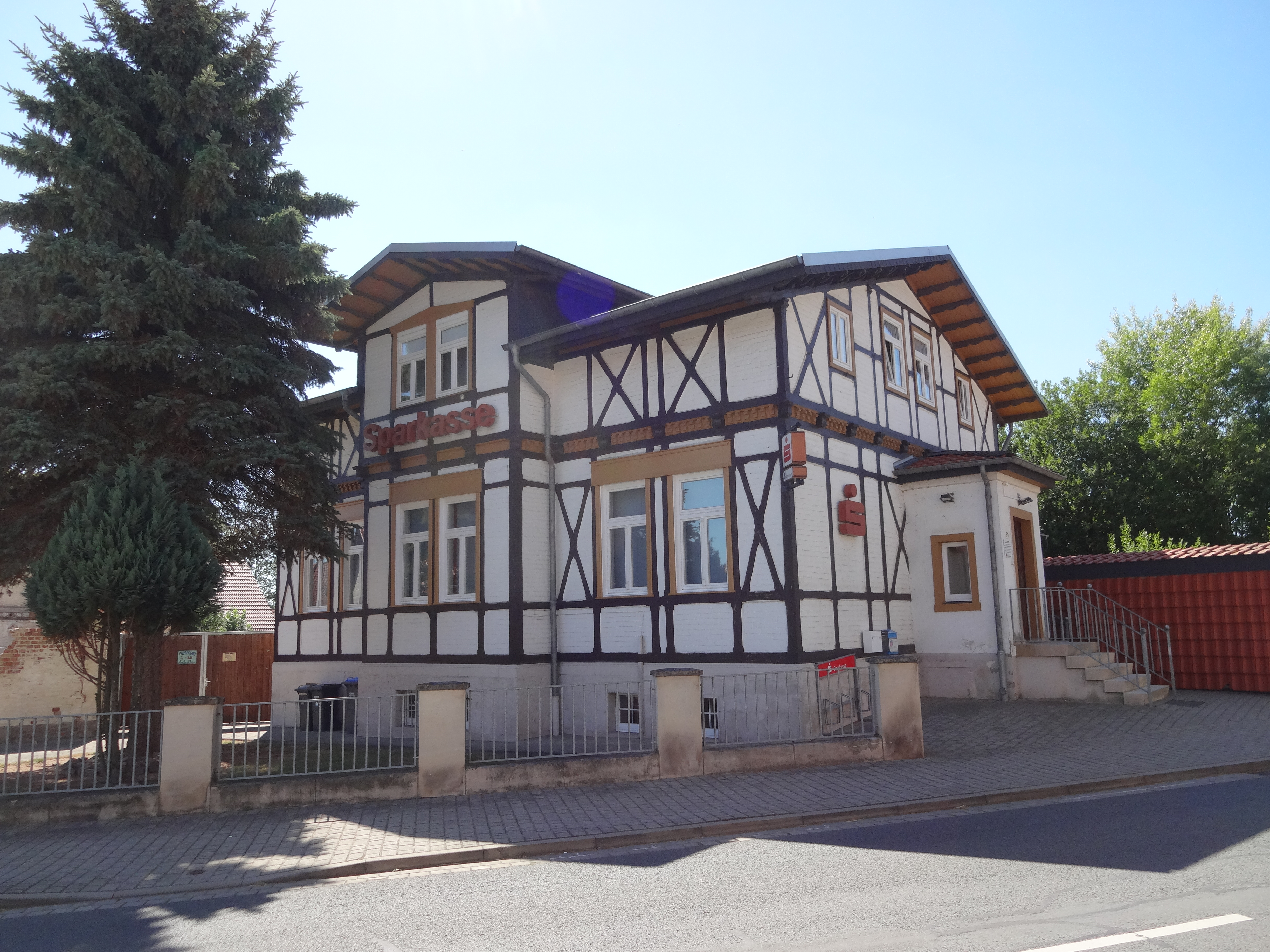 denkmalgeschütztes Geschäftshaus in der Ernst-Thälmann-Straße 51 in Dedeleben (Sparkasse)